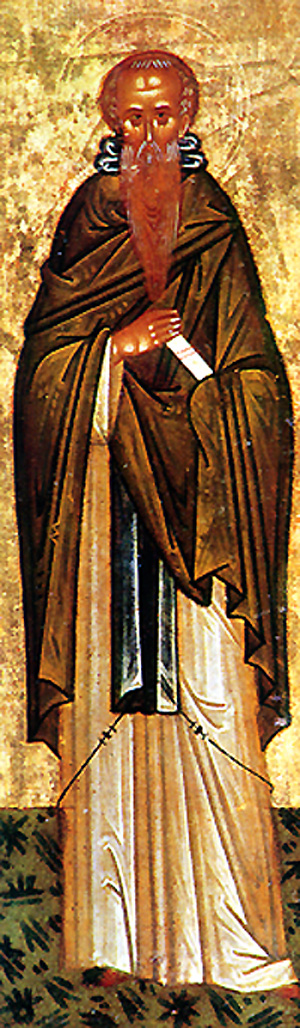 Caritão, o Confessor